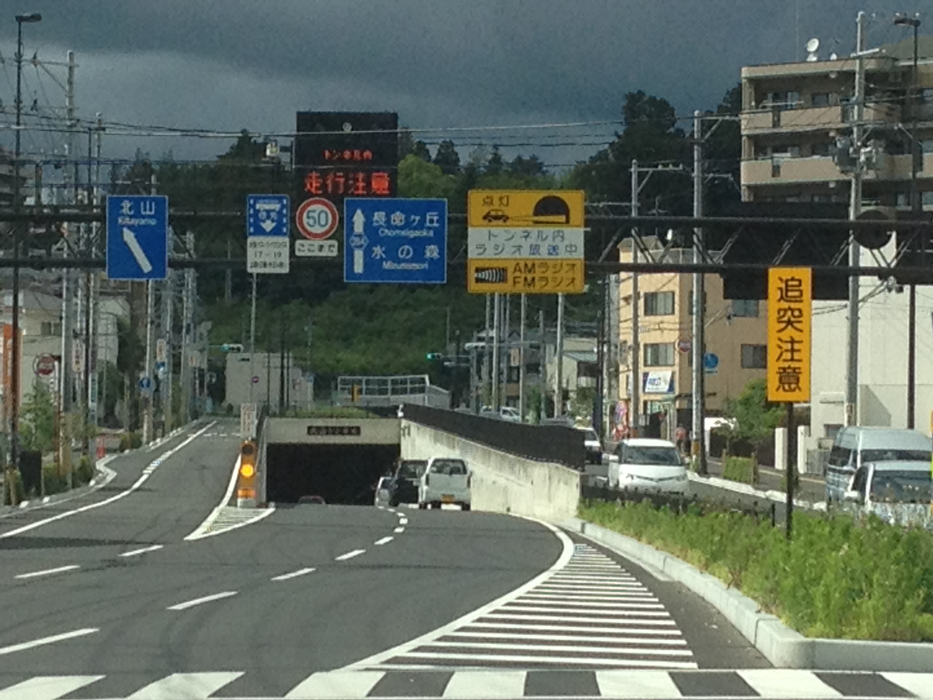 仙台市 北山トンネル南側入口